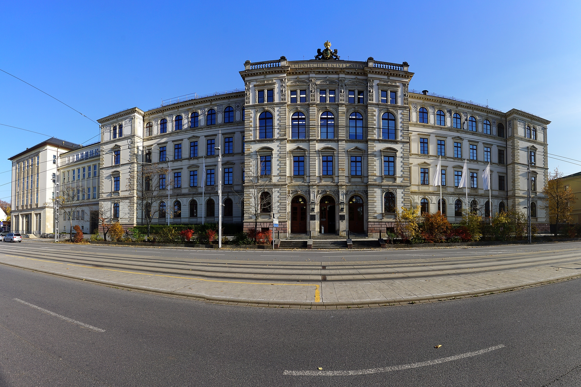 Das Hauptgebäude der TU Chemnitz an der Straße der Nationen, 2015